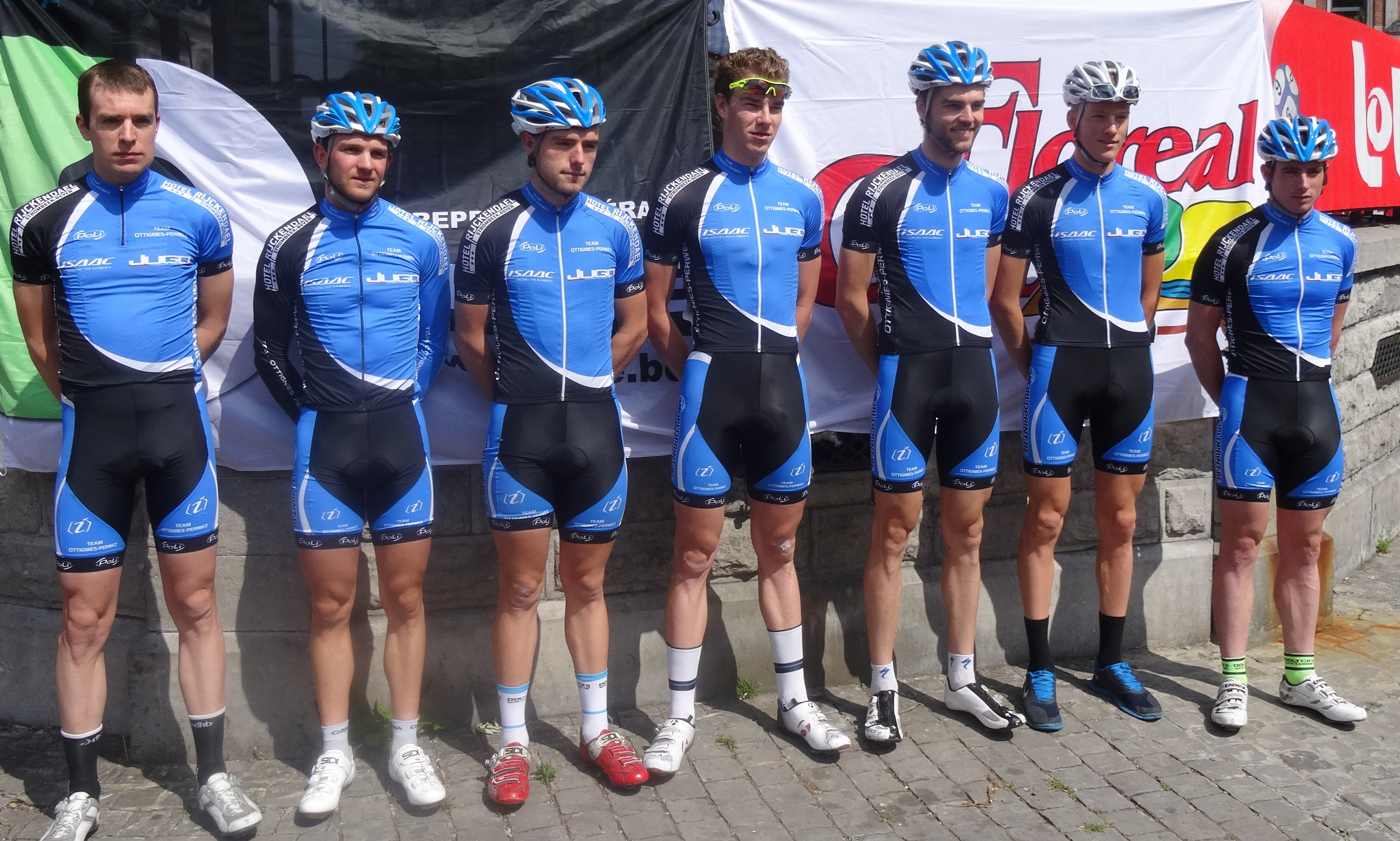 Reportage réalisé le samedi 17 mai à l'occasion du départ du Grand Prix Criquielion 2014 à Boussu, Belgique.